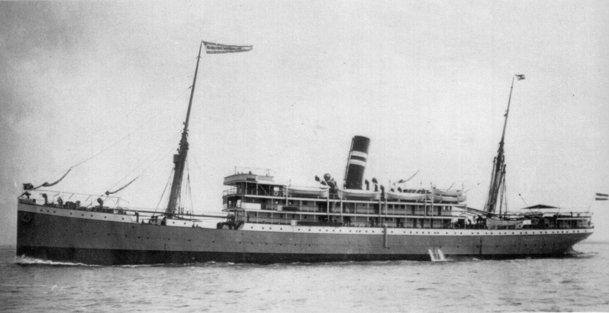 Der Postdampfer ELEONORE WOERMANN auf seiner Probefahrt